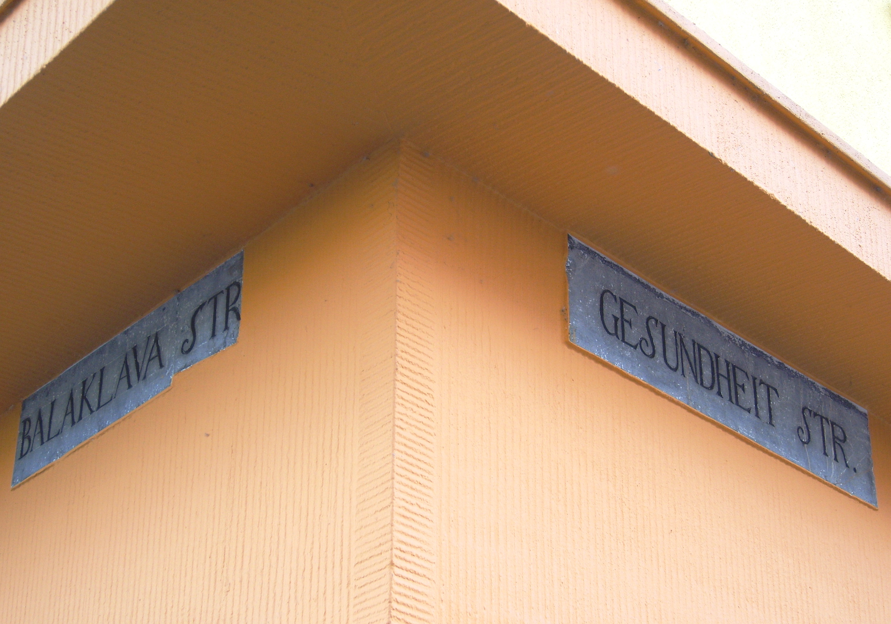 Alte Straßenschilder Ecke Uferstraße / Neustraße in der Südlichen Innenstadt von Eschweiler